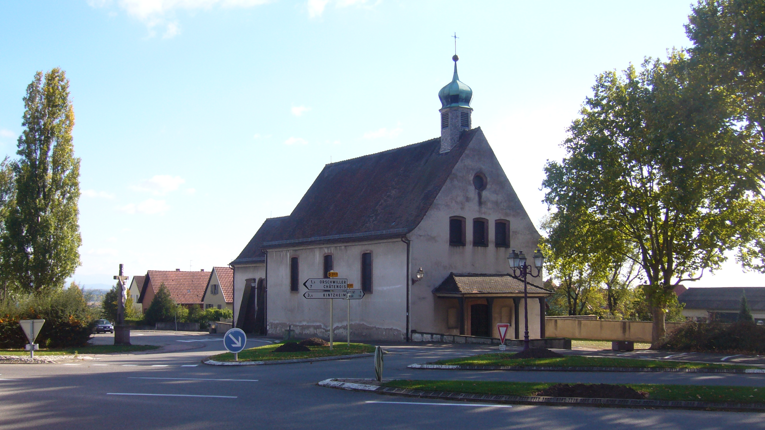 Chapelle Sainte Croix, Saint-Hippolyte